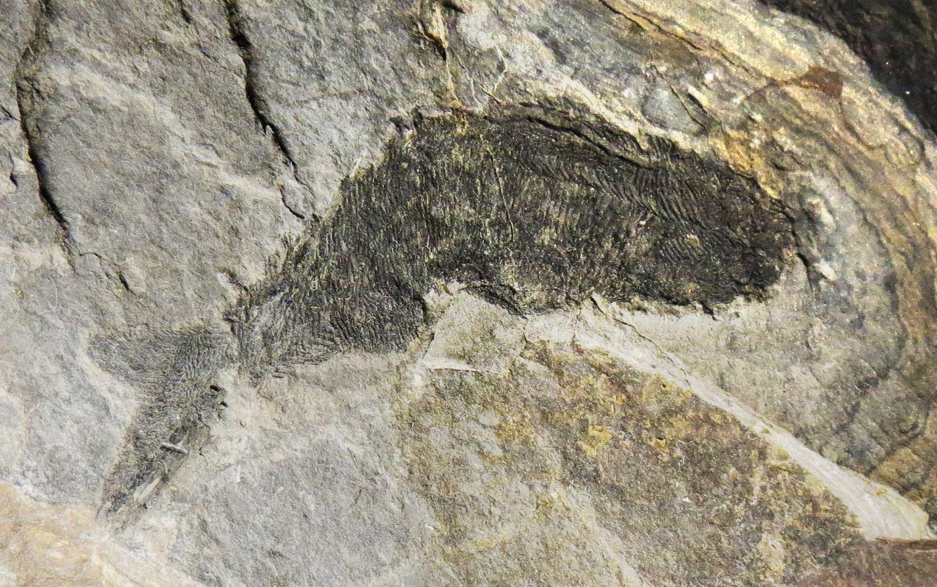 Fossil of Birkenia, an extinct fish- Took the picture at Naturalis, Leiden